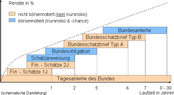 Rendite bei verschiedenen Laufzeiten der Bundeswertpapiere